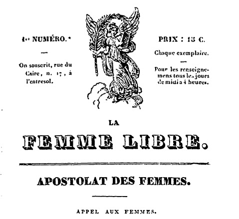 Entête couverture du n° 1 du premier journal réalisé et écrit par des femmes pour des femmes au XIXe siècle